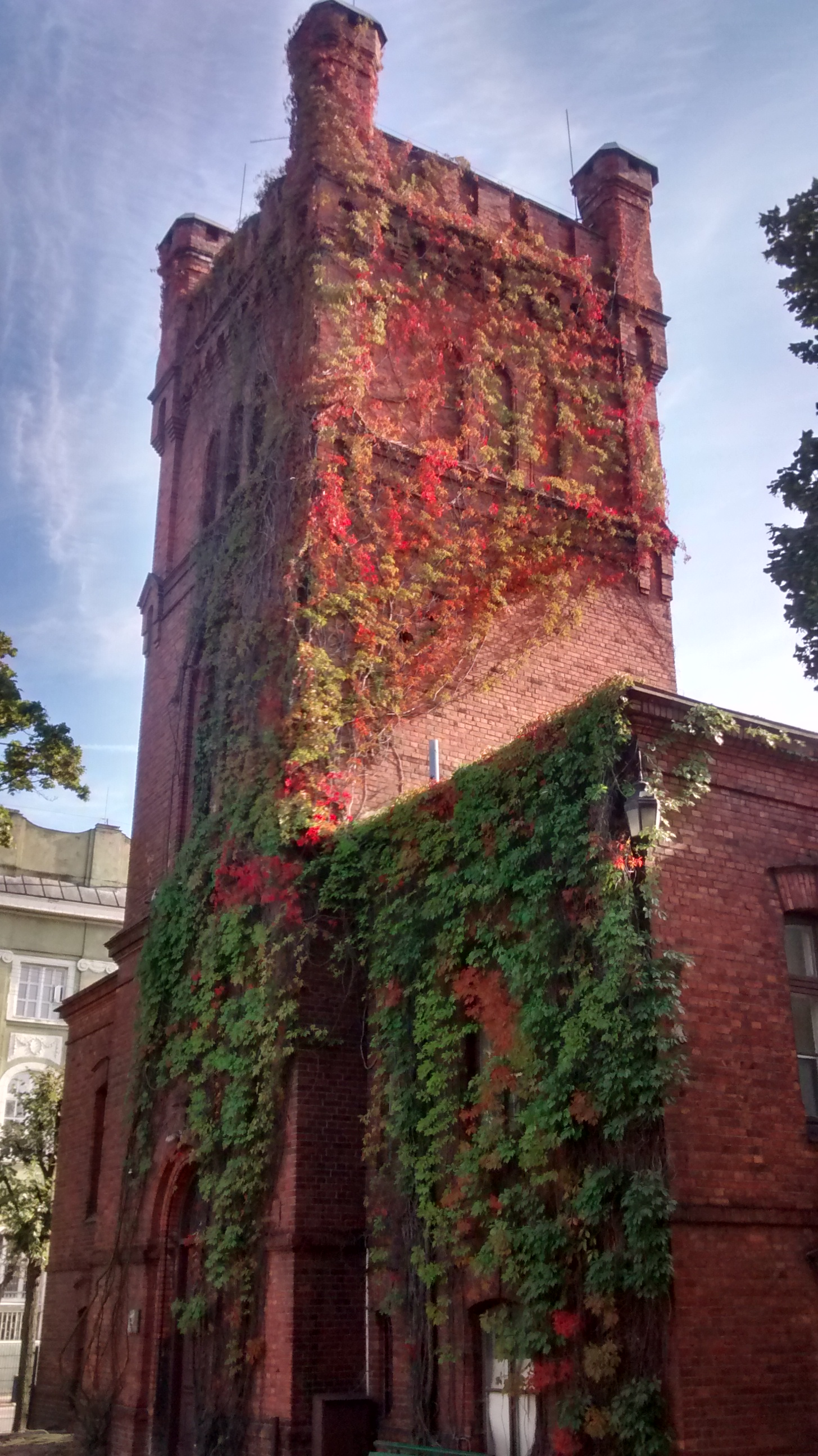 Kordegarda znajdująca należąca do kompleksu Osady Pałacowej